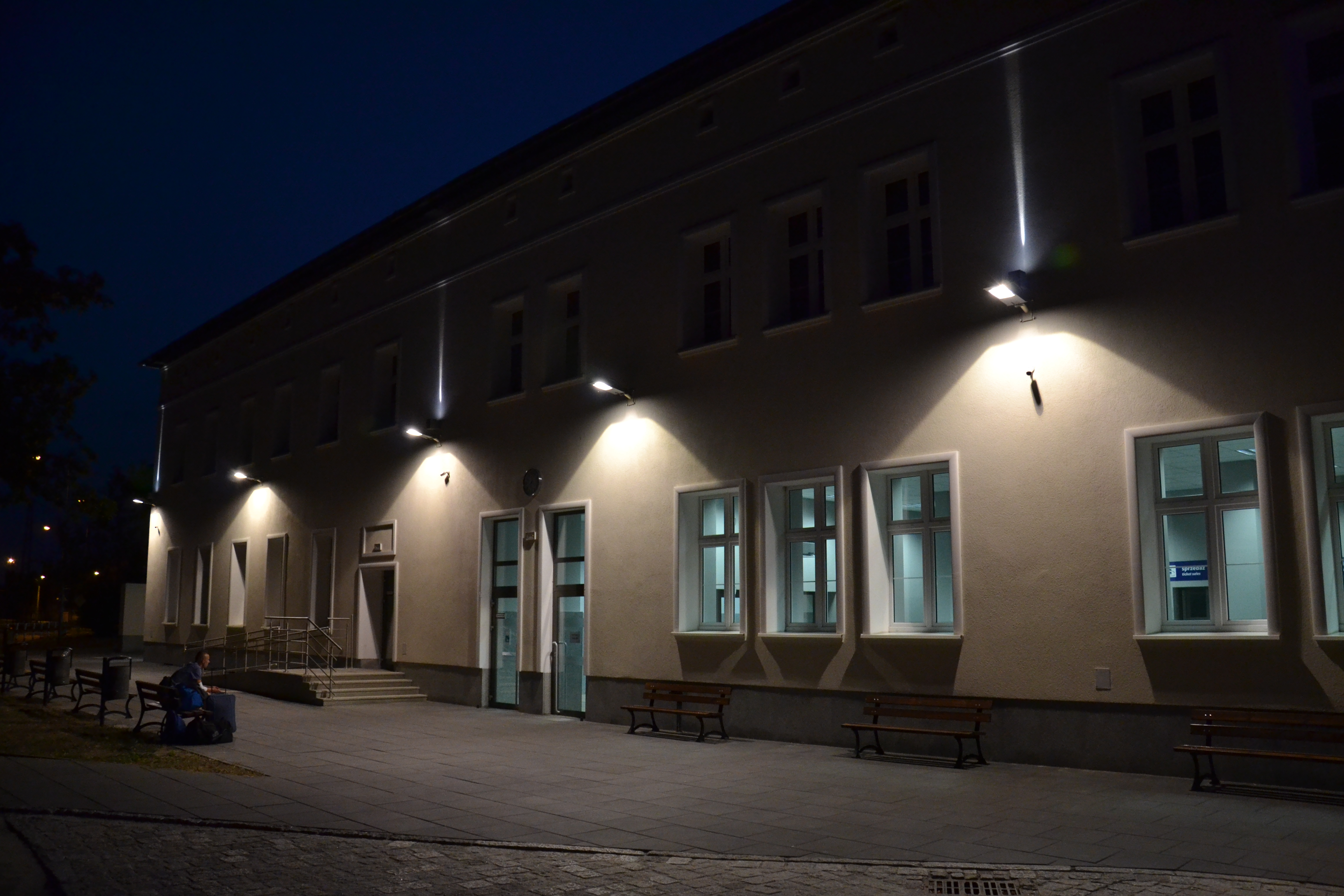 Widok dworca w Jaworzynie Ślaskiej od strony miasta This photo was taken during Railway Wikiexpedition 2015 set up by Wikimedia Polska Association in cooperation with Fundacja Grupy PKP. You can see all photographs in category Wikiekspedycja kolejowa 2015.